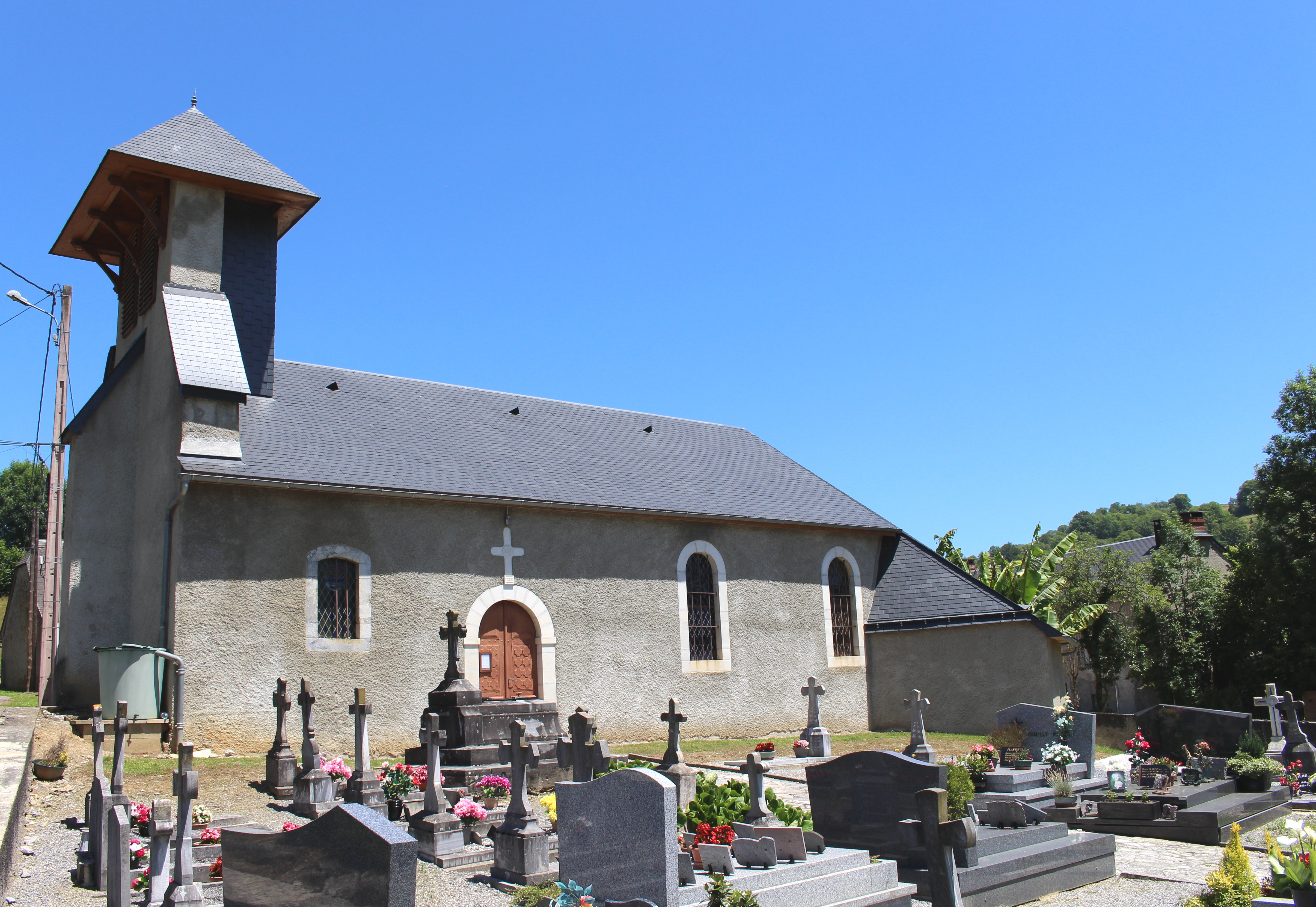 Église Saint-Jean-l'Evangéliste de Batsère (Hautes-Pyrénées)